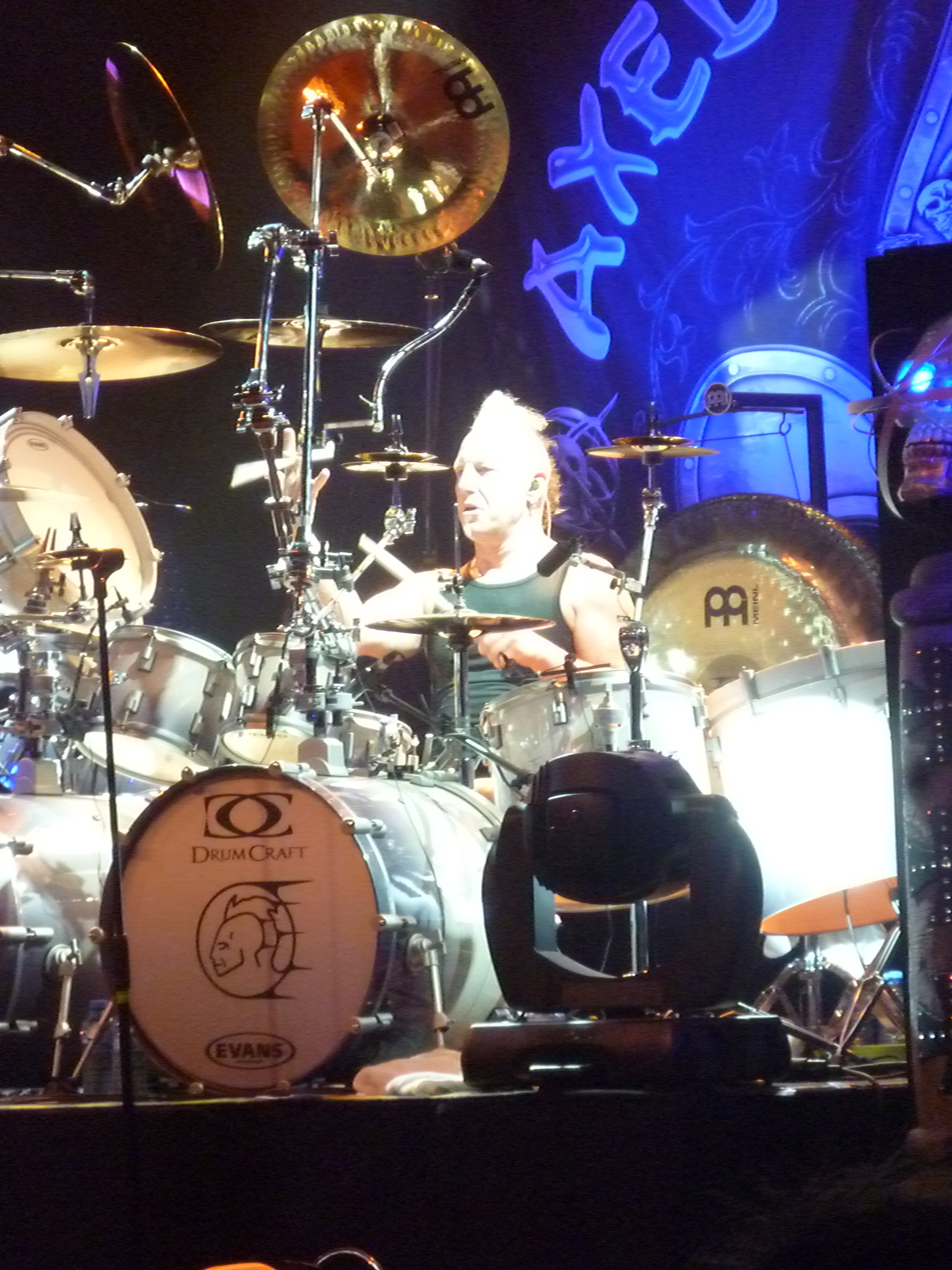 Axel Rudi Pell live in der Garage Saarbrücken